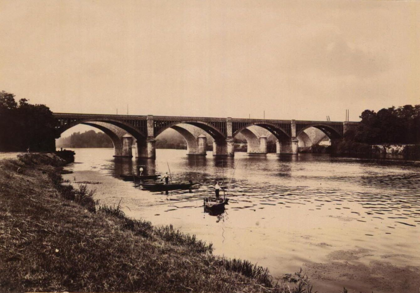 Vue des ponts ferroviaires de Maisons-Laffite (Yvelines) sur le grand bras de la Seine en 1895 ou 1896. Au premier plan, l'ancien pont en fonte datant de 1859, en arrière plan le pont de pierre nouvellement construit.